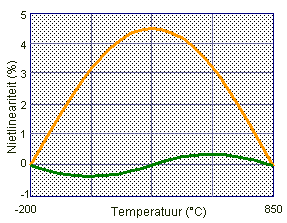 Procentuele afwijking van een Pt100 over het gehele bereik